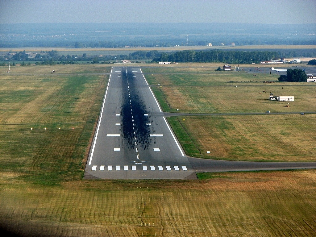 Přiblížení na dráhu 32P